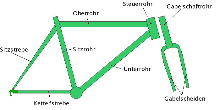 Das Bild zeigt eine schematische Darstellung eines Fahrrad-Diamantrahmens Bild wurde mit Draw selbst erstellt Erstellt von: Bernd Gutmann